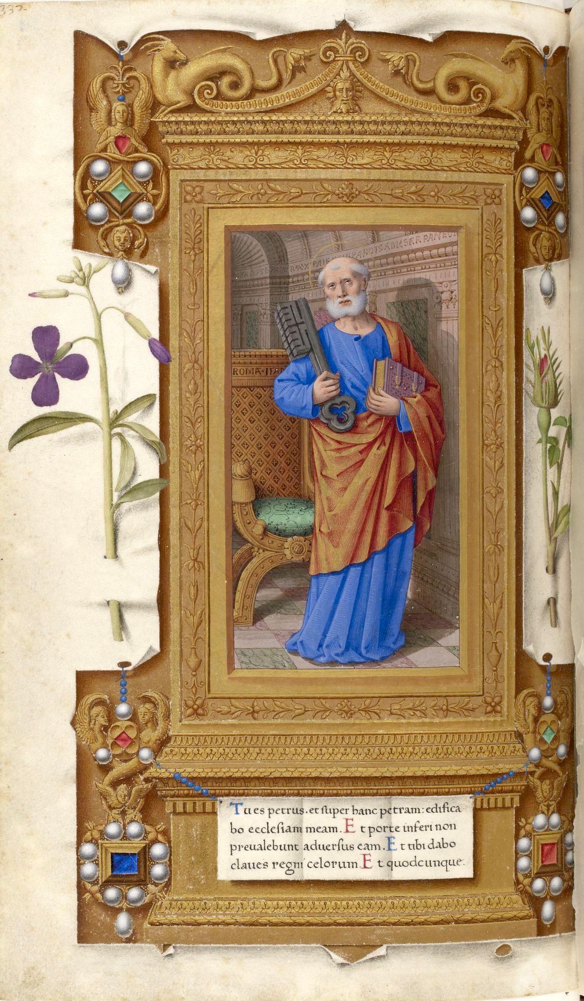 Aragon-f332-Pierre